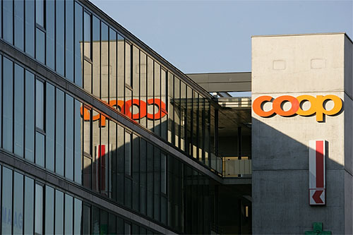 coop in Oberwil